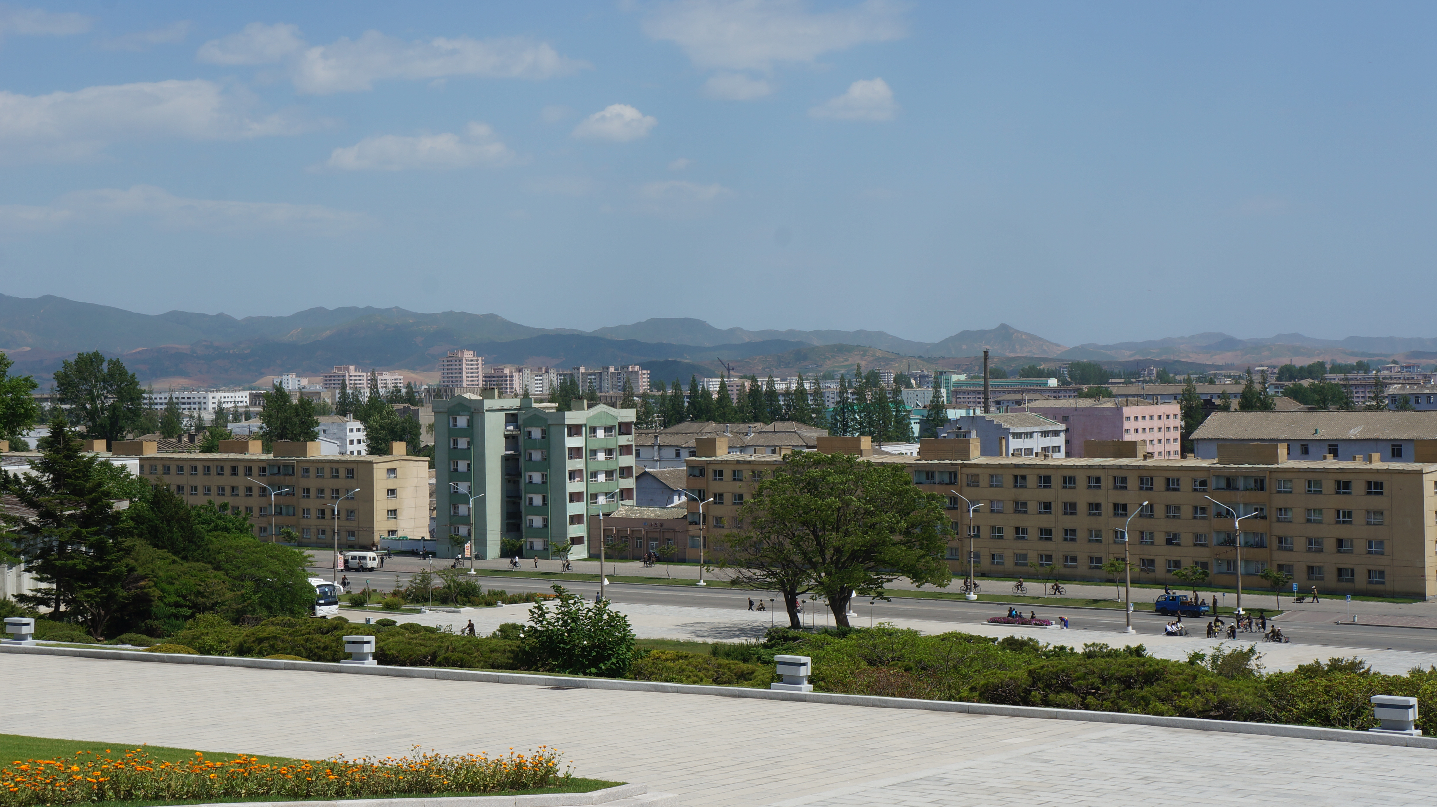 Hamhung